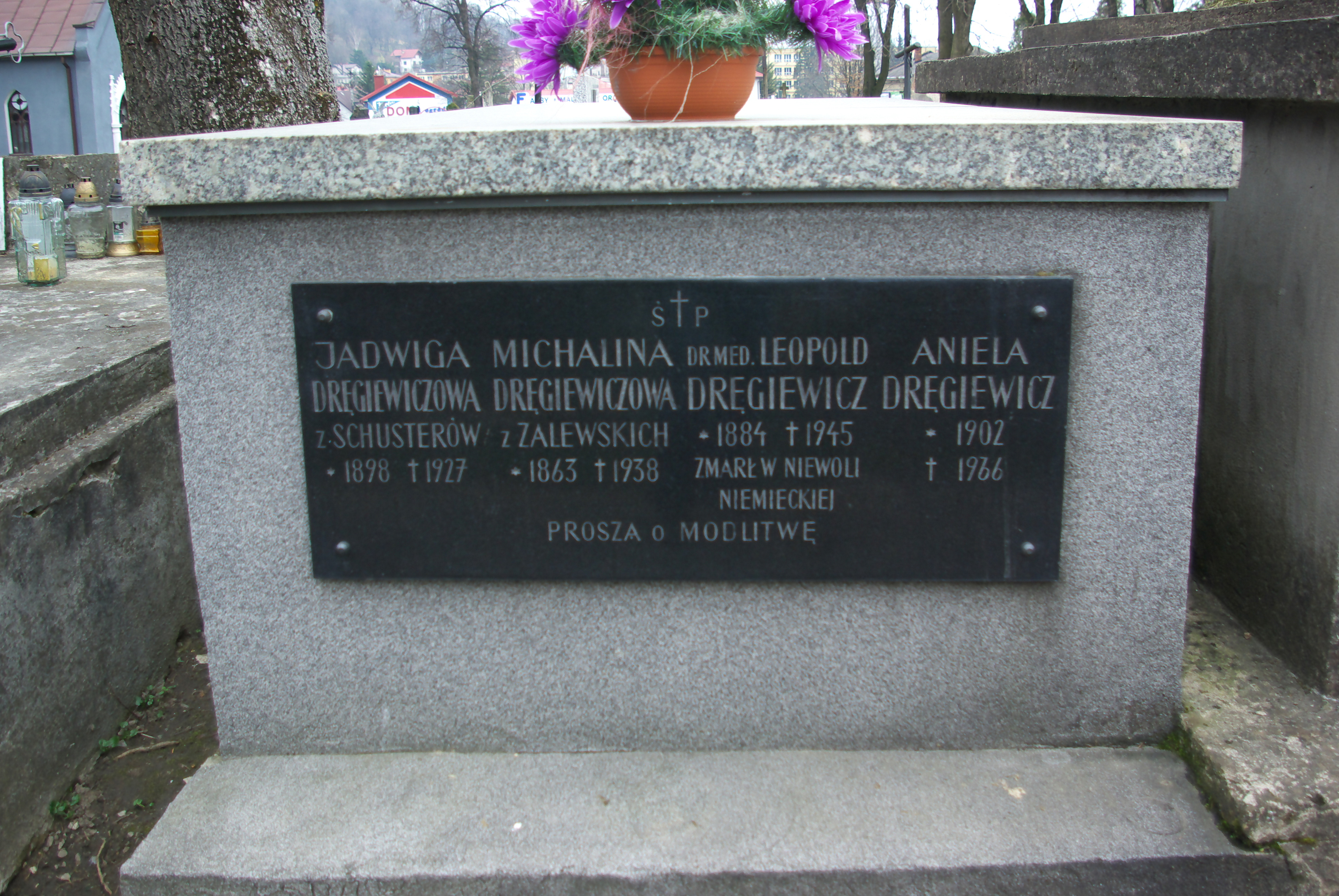 Grobowiec rodziny Dręgiewiczów na Cmentarzu Centralnym w Sanoku